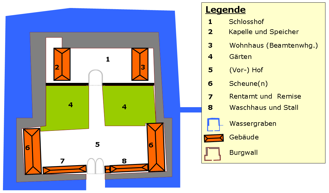 Aufbau der Burg Habitzheim um 1777 bis etwa 1850, nach Quellen: Hessisches Staatsarchiv Darmstadt (Archiv B15)